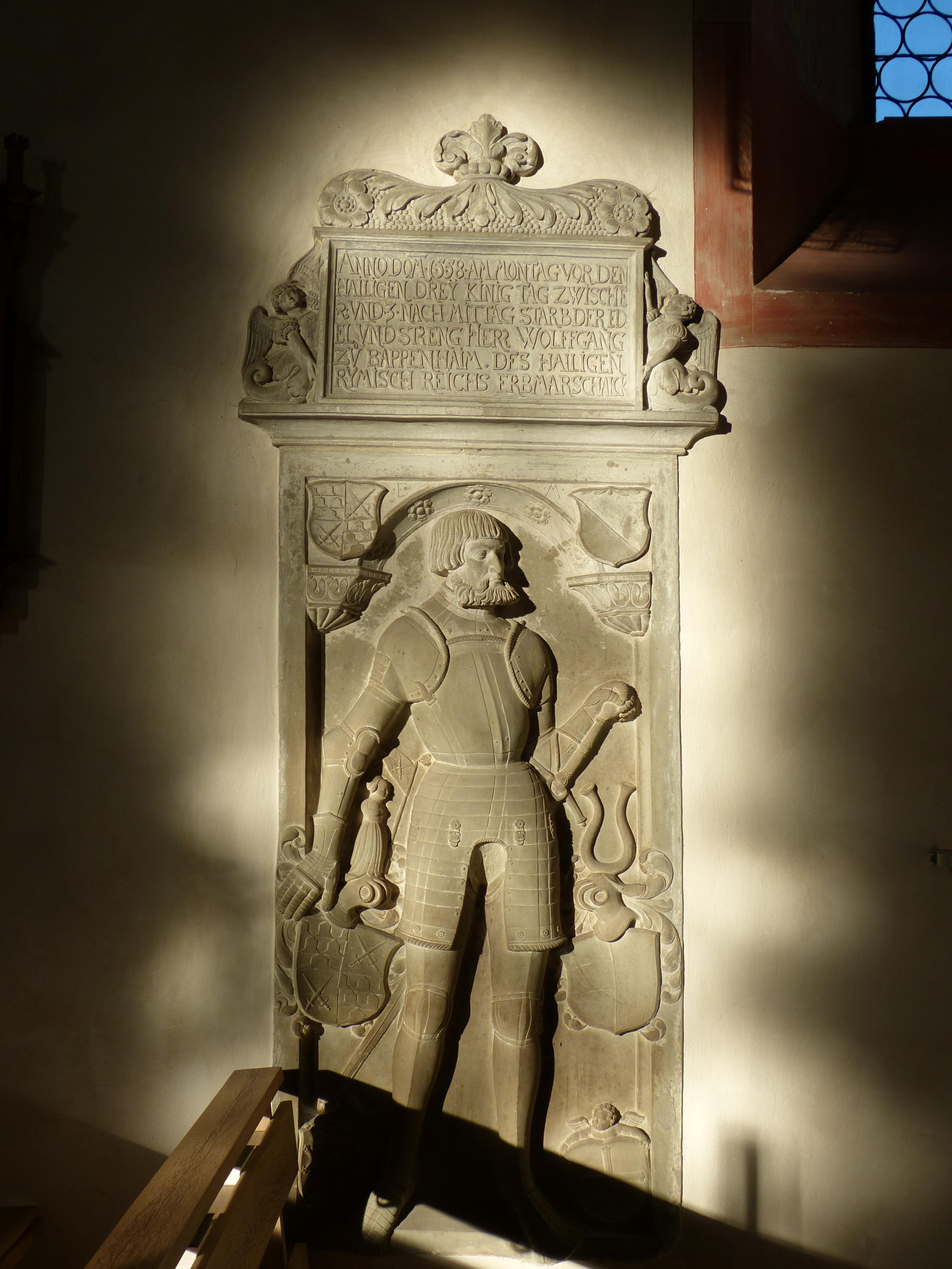 Epitaph des Wolfgang von Pappenheim († 1558) in der Stiftskirche St. Philipp und Jakob in Bad Grönenbach, Landkreis Unterallgäu, Bayern